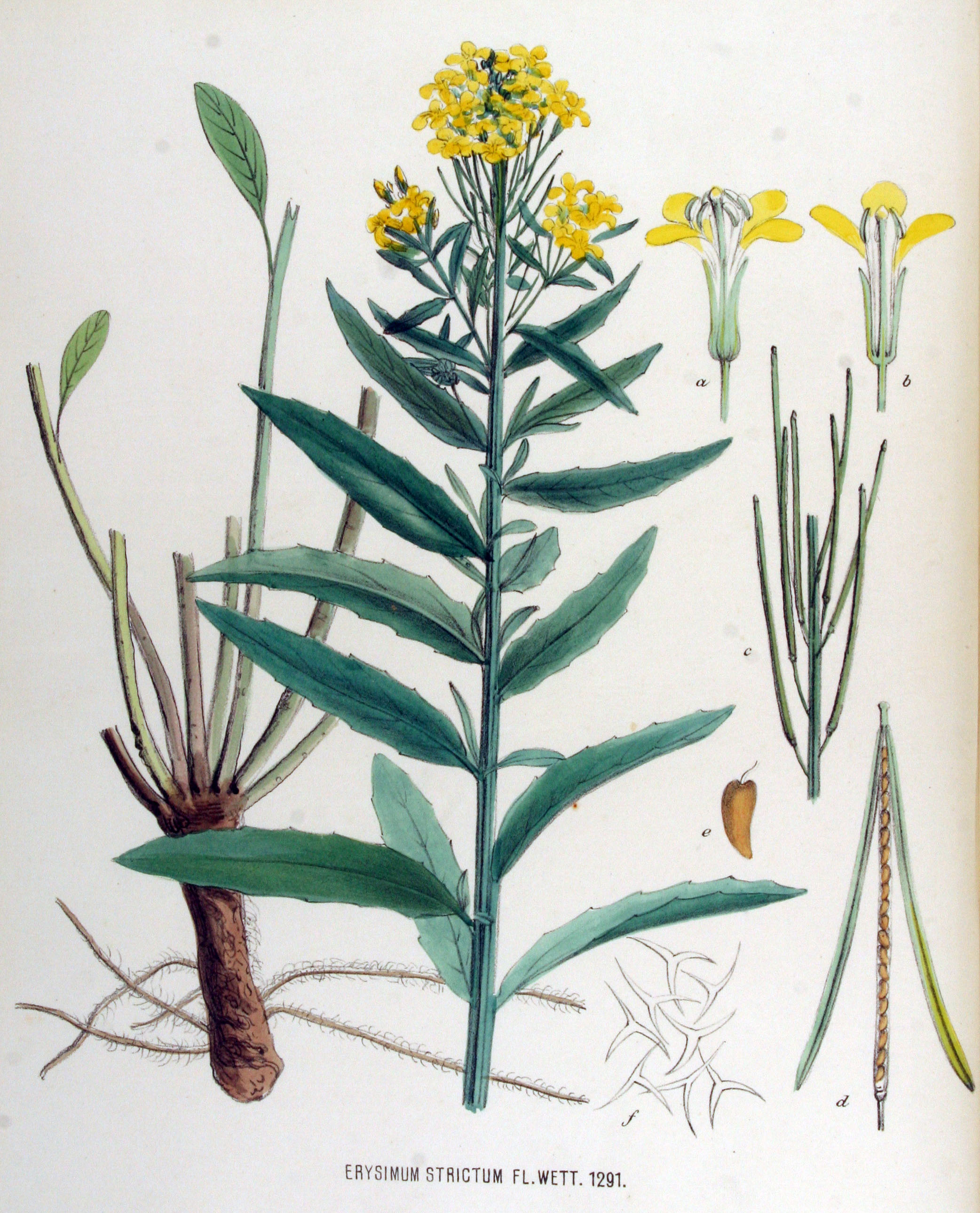 Erysimum hieracifolium L. (Syn. Erysimum strictum P. Gaertn., B. Mey. & Scherb.)